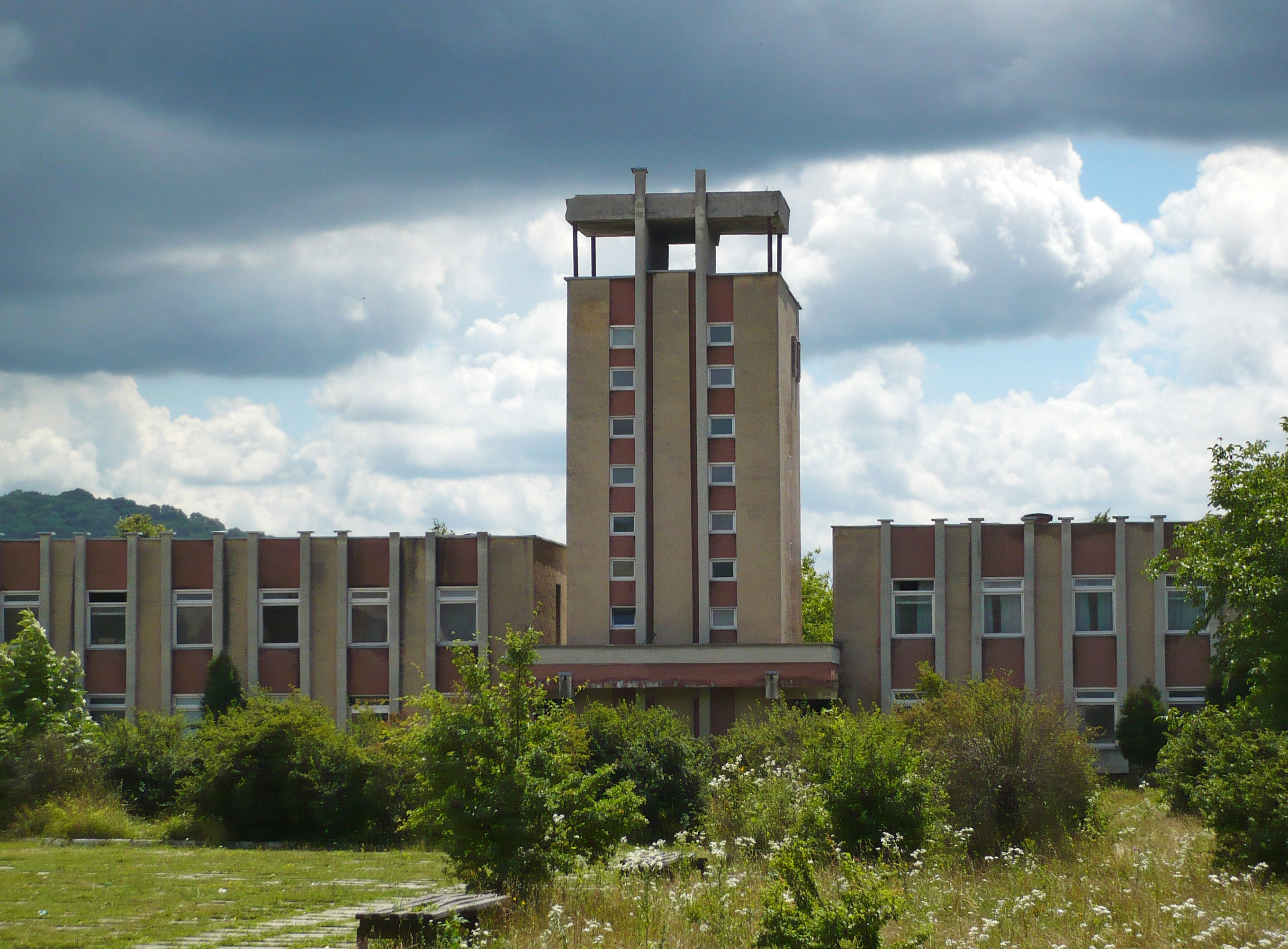 Biały Kamień na Ukrainie - budynek miejscowej administracji